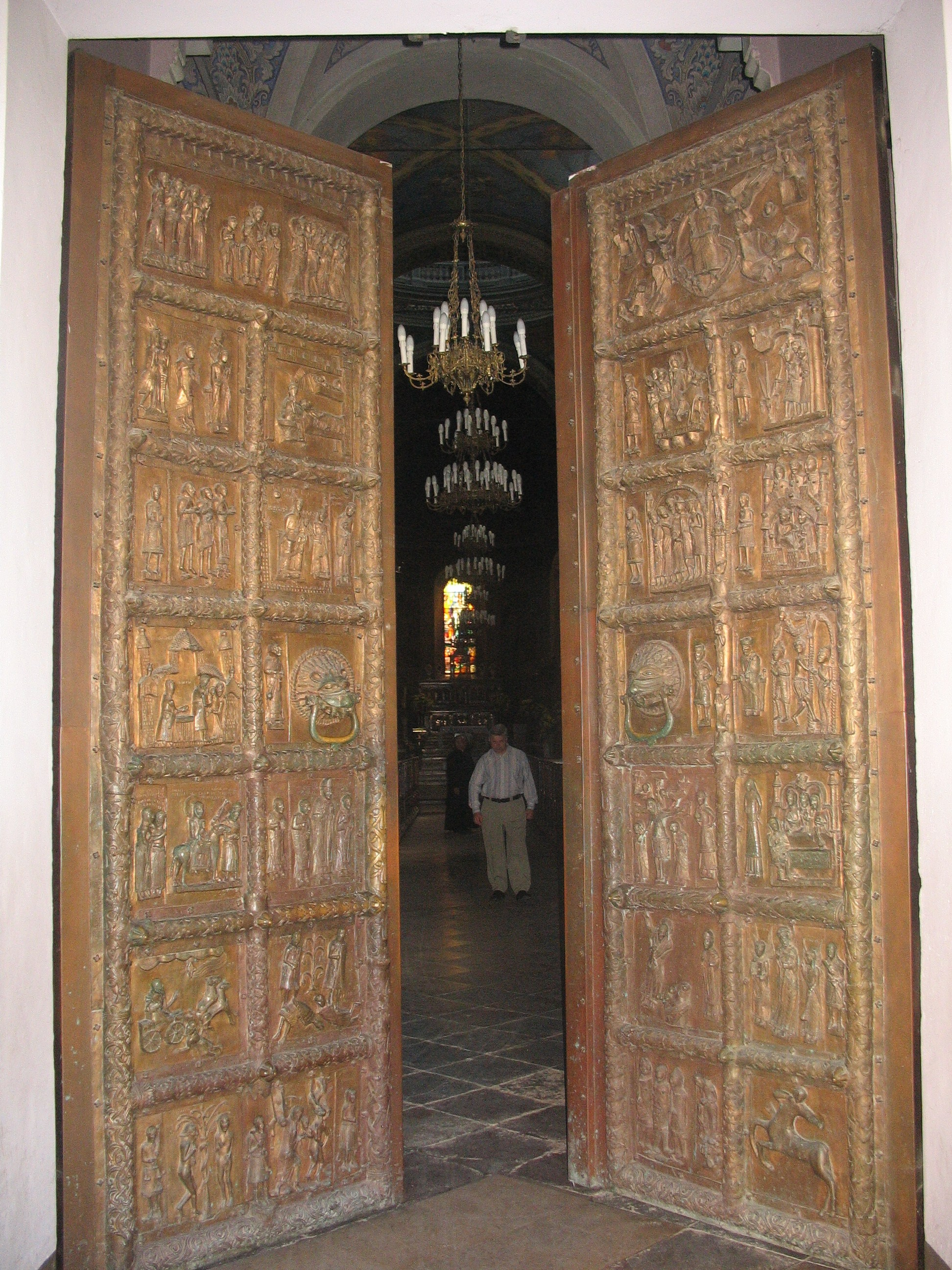 Kopia romańskich Drzwi Płockich.